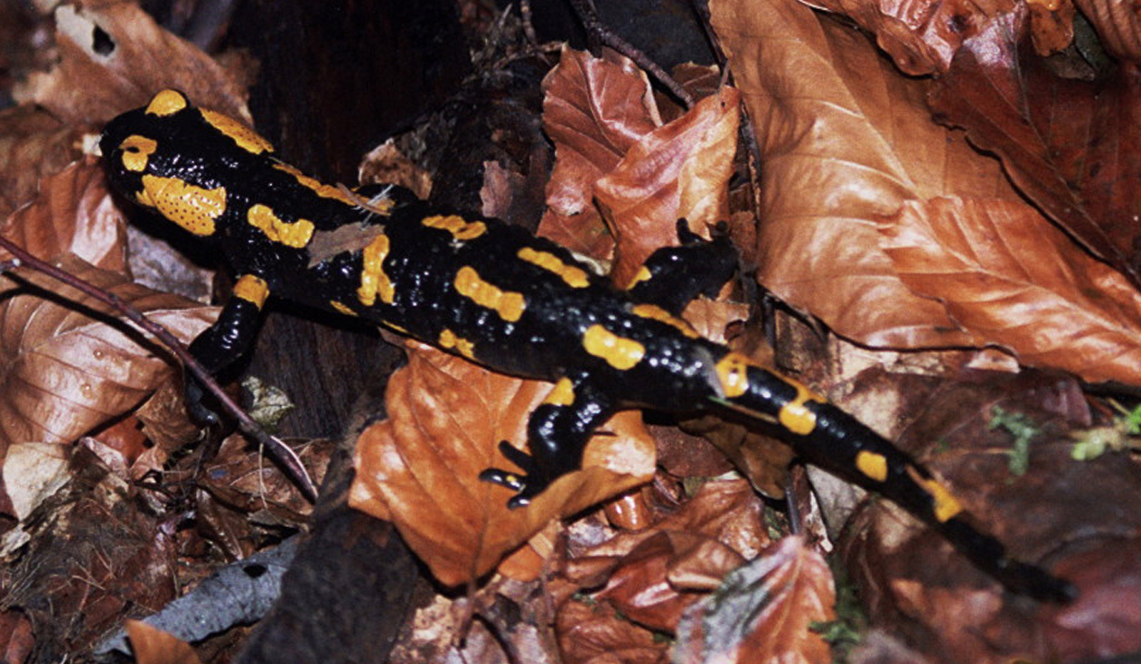 Salamandra plamista (Salamandra salamandra)